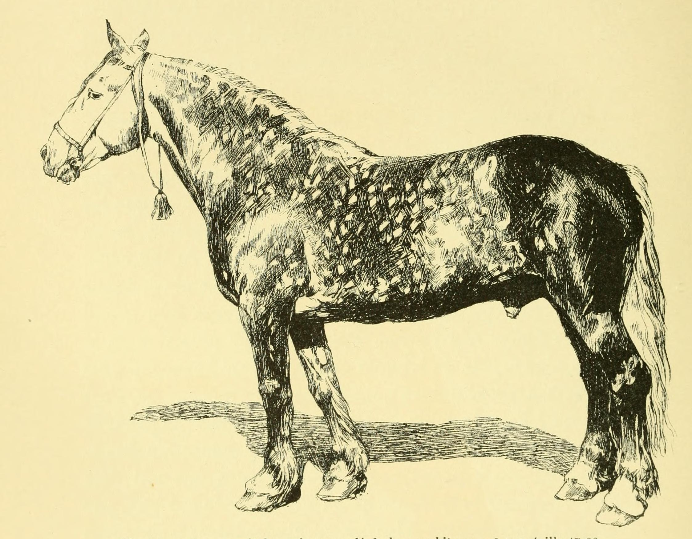 Les races chevalines : avec une étude spéciale sur les chevaux russes /